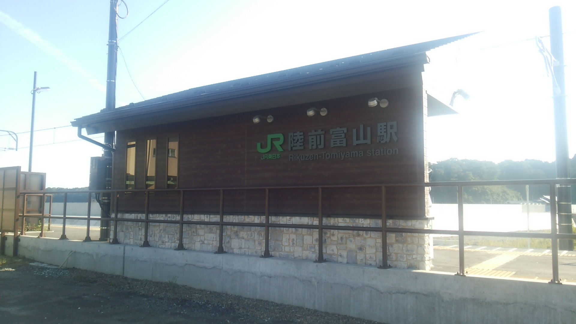 陸前富山駅・待合室裏